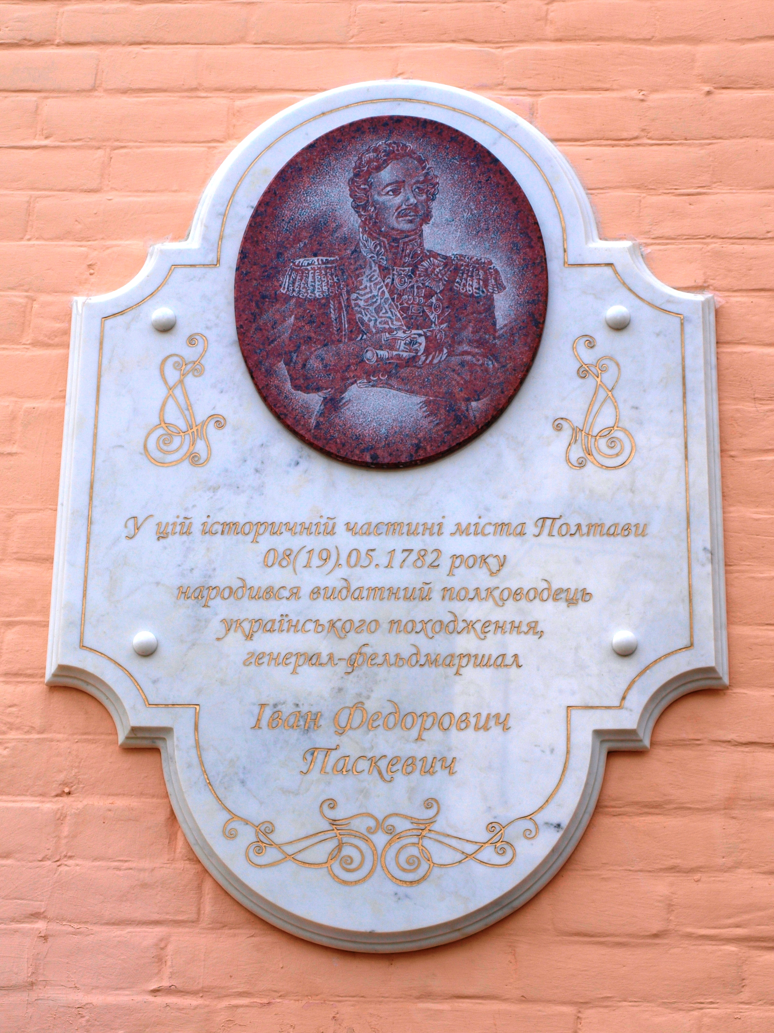 Мемориальная доска в честь генерал-фельдмаршала Ивана Фёдоровича Паскевича в Полтаве (ул.Октябрьская, 8)